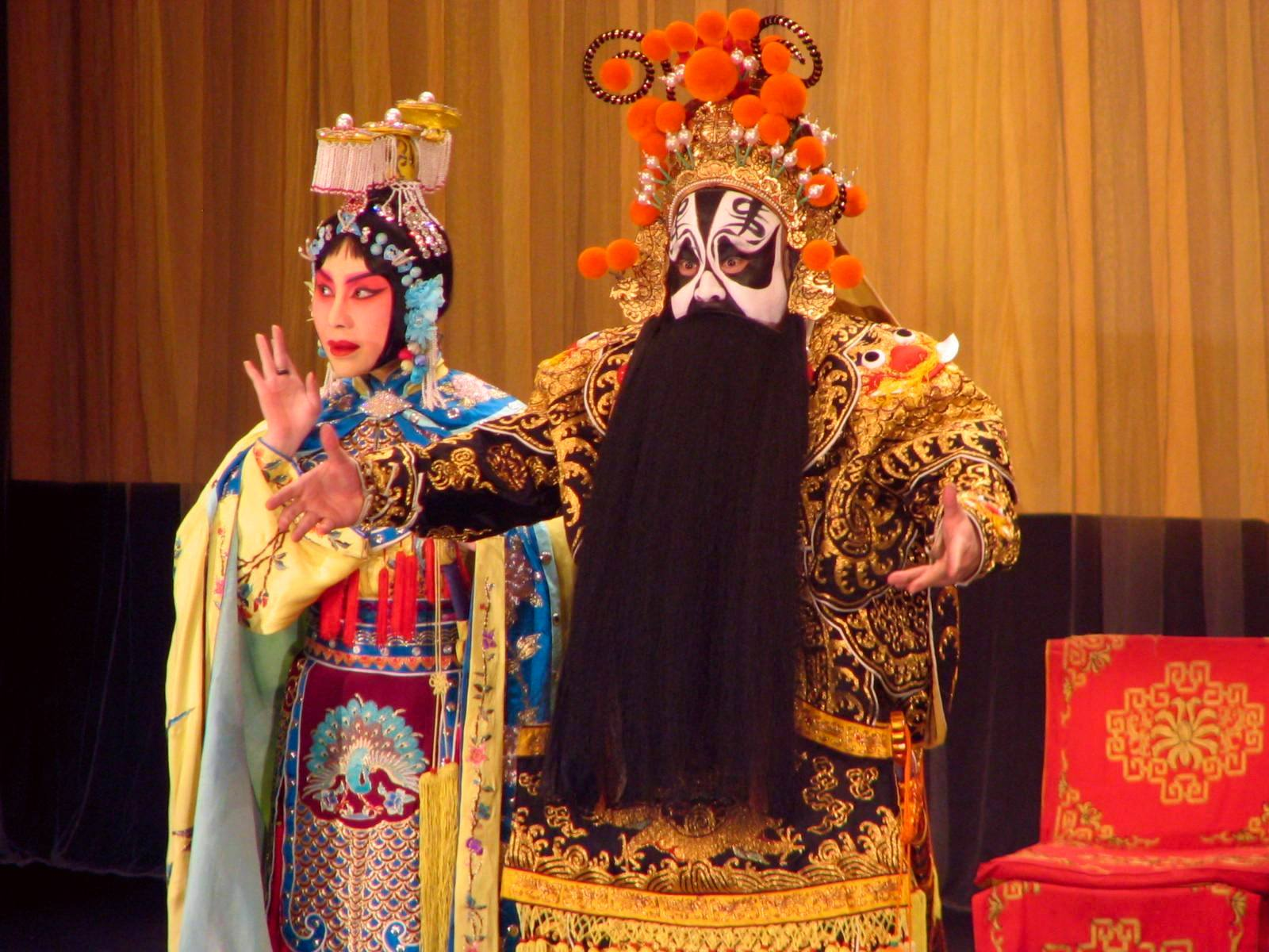 Сцена из оперы «Прощай, моя наложница» молодёжной труппы пекинской оперы